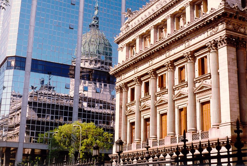 Der Kongress spiegelt sich in der Kongressbibliothek